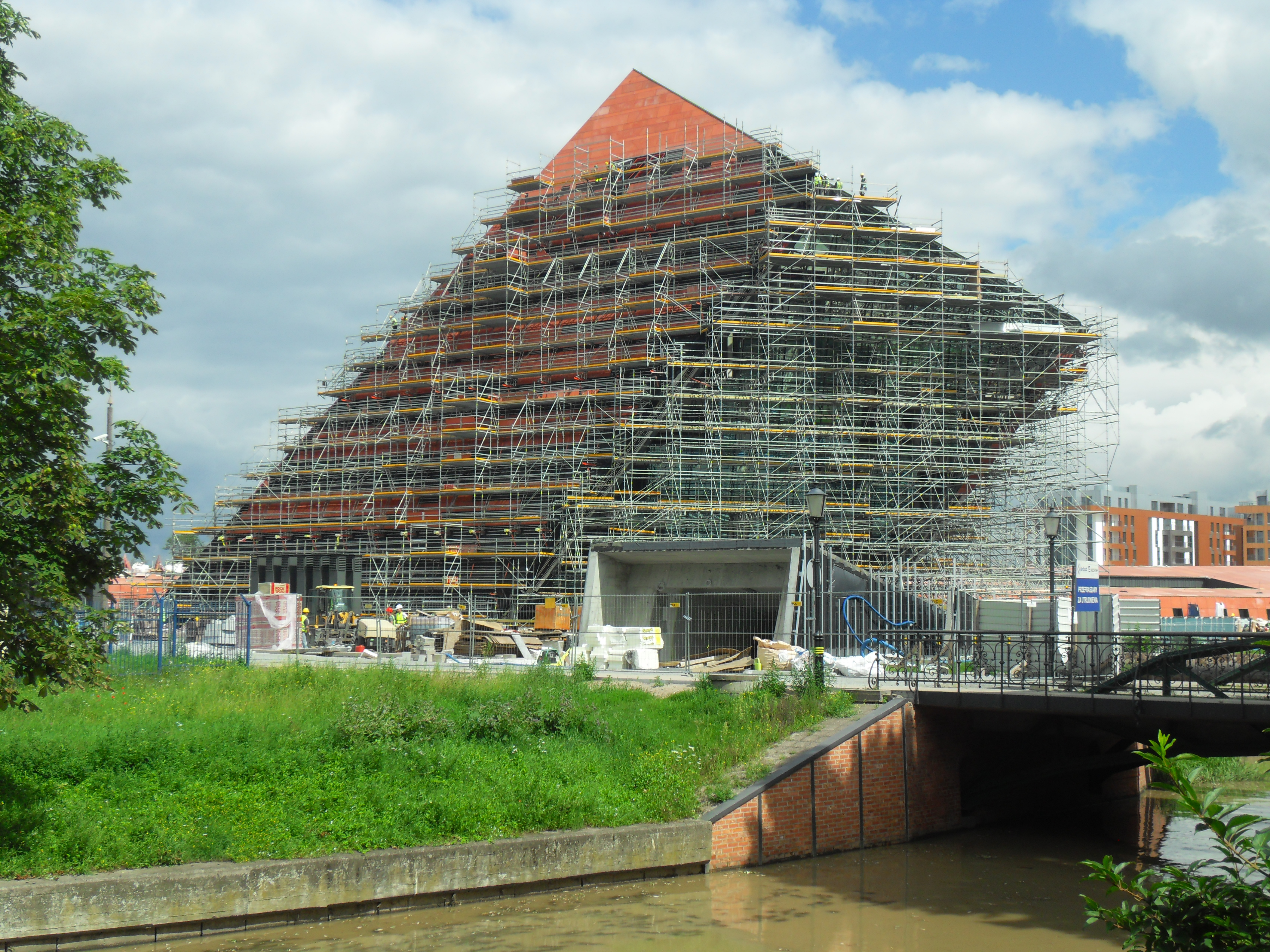 Gdańsk Śródmieście. Muzeum II Wojny Światowej w Gdańsku, w budowie. Na pierwszym planie Kanał Raduni.